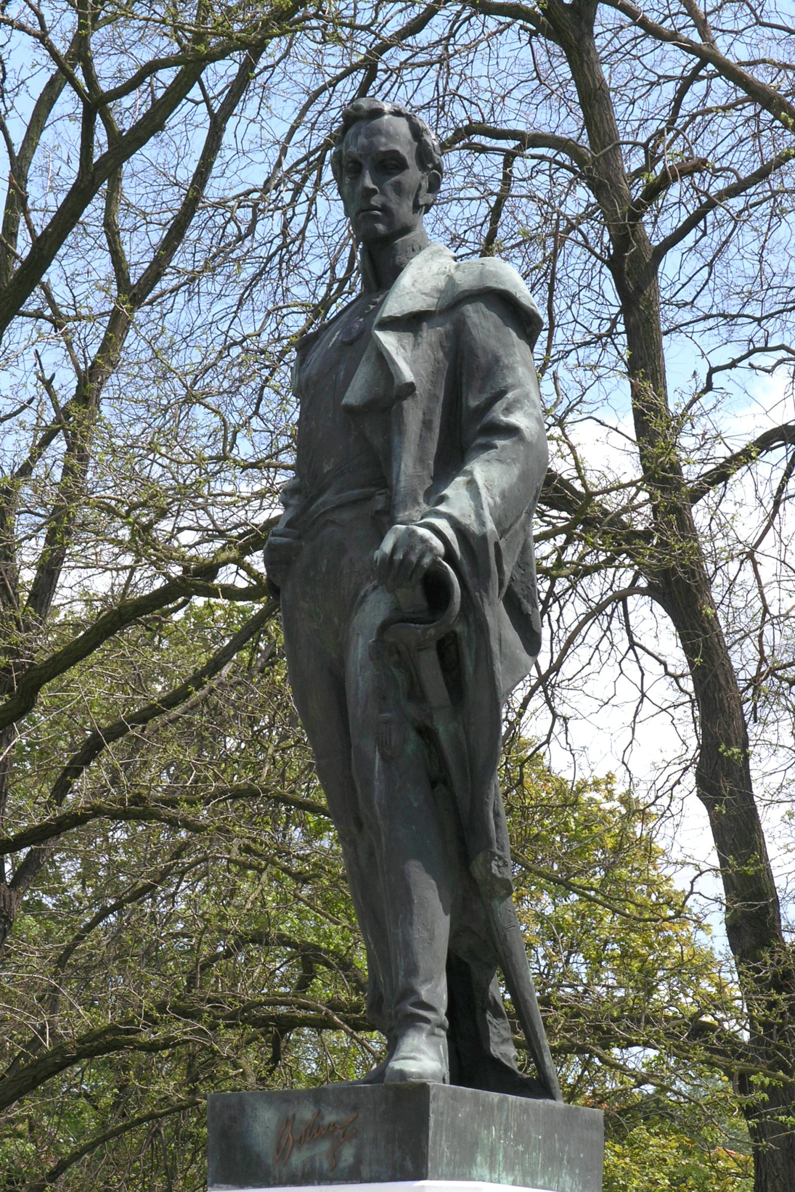 Praha-Bubeneč - socha Simóna Bolívara, součást Bolívarova pomníku v parku Generála Lázaro Cárdenase